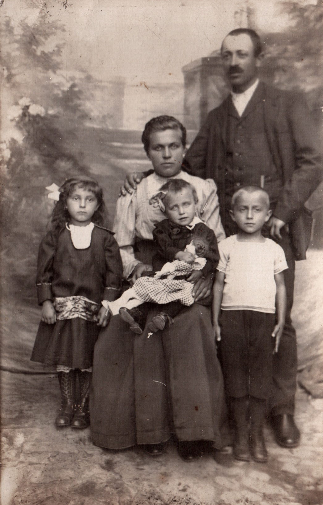 Jan Pechanec s manželkou a dětmi